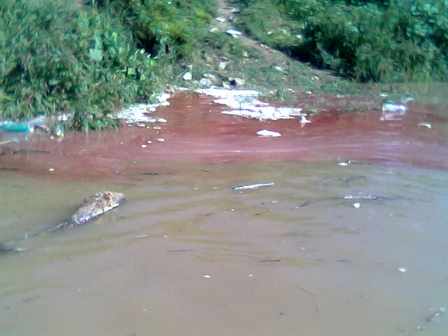 Slavonski Brod, rijeka Sava (zagađenje rijeke)